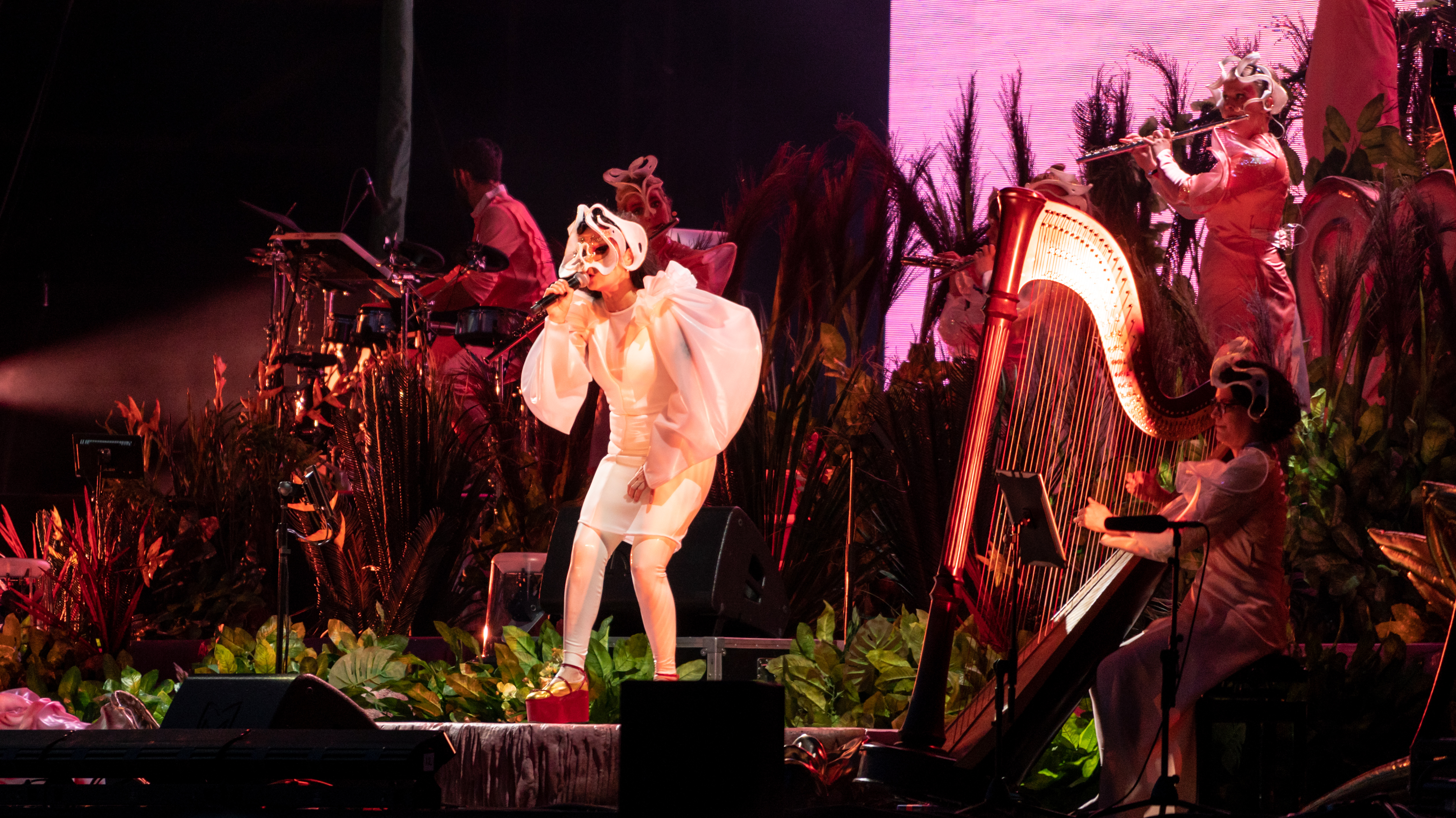 APEVicPark270518-97